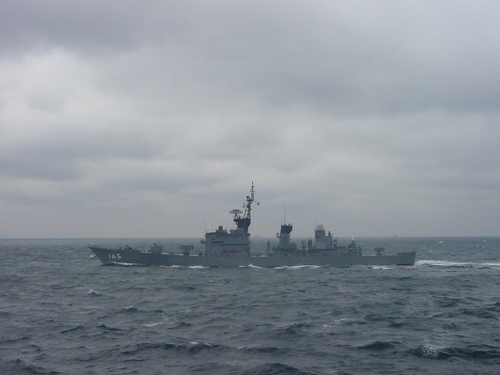 2000年自衛隊観艦式に参加時の護衛艦きくづき。